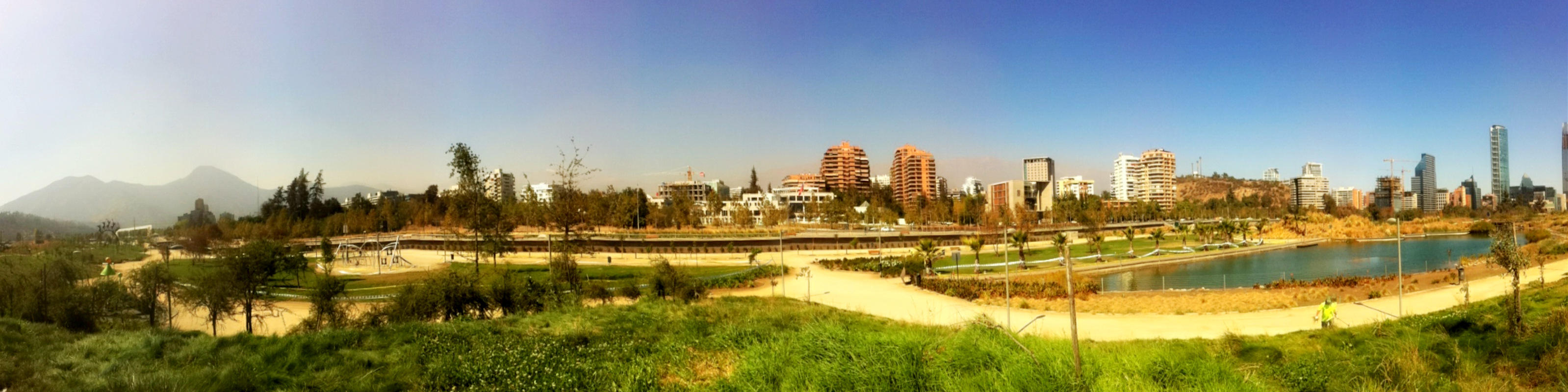 Parque Bicentenario